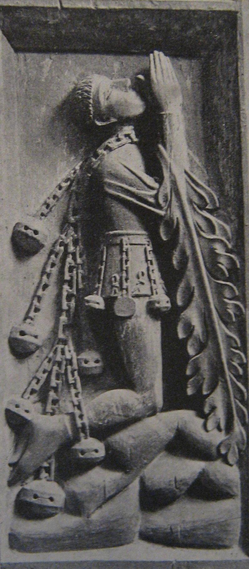 Korstol, ursprungligen från Västerås Domkyrka, nu i Statens historiska museum, men bild av Fogden Jösse Eriksson.